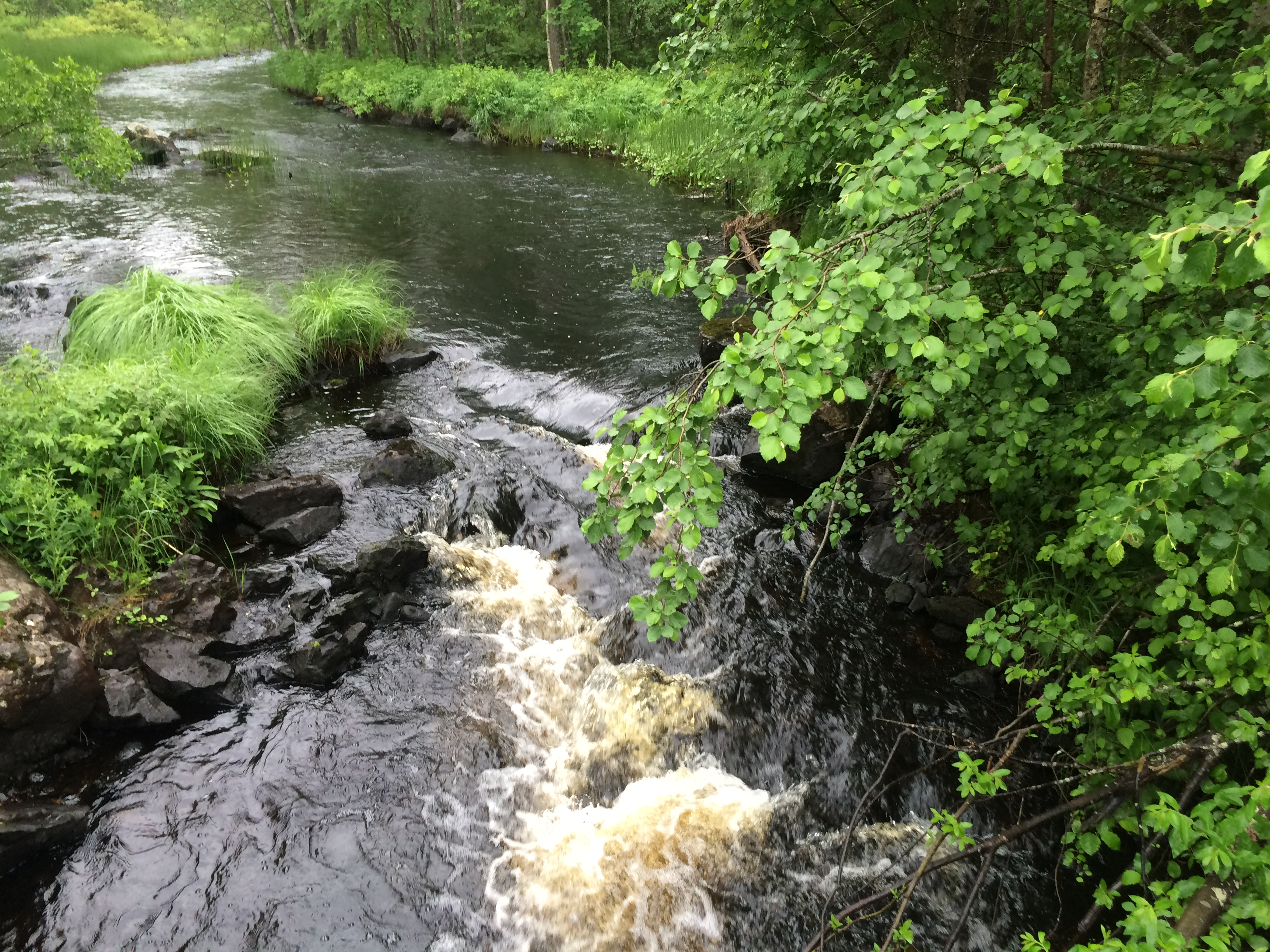 Гормозерка